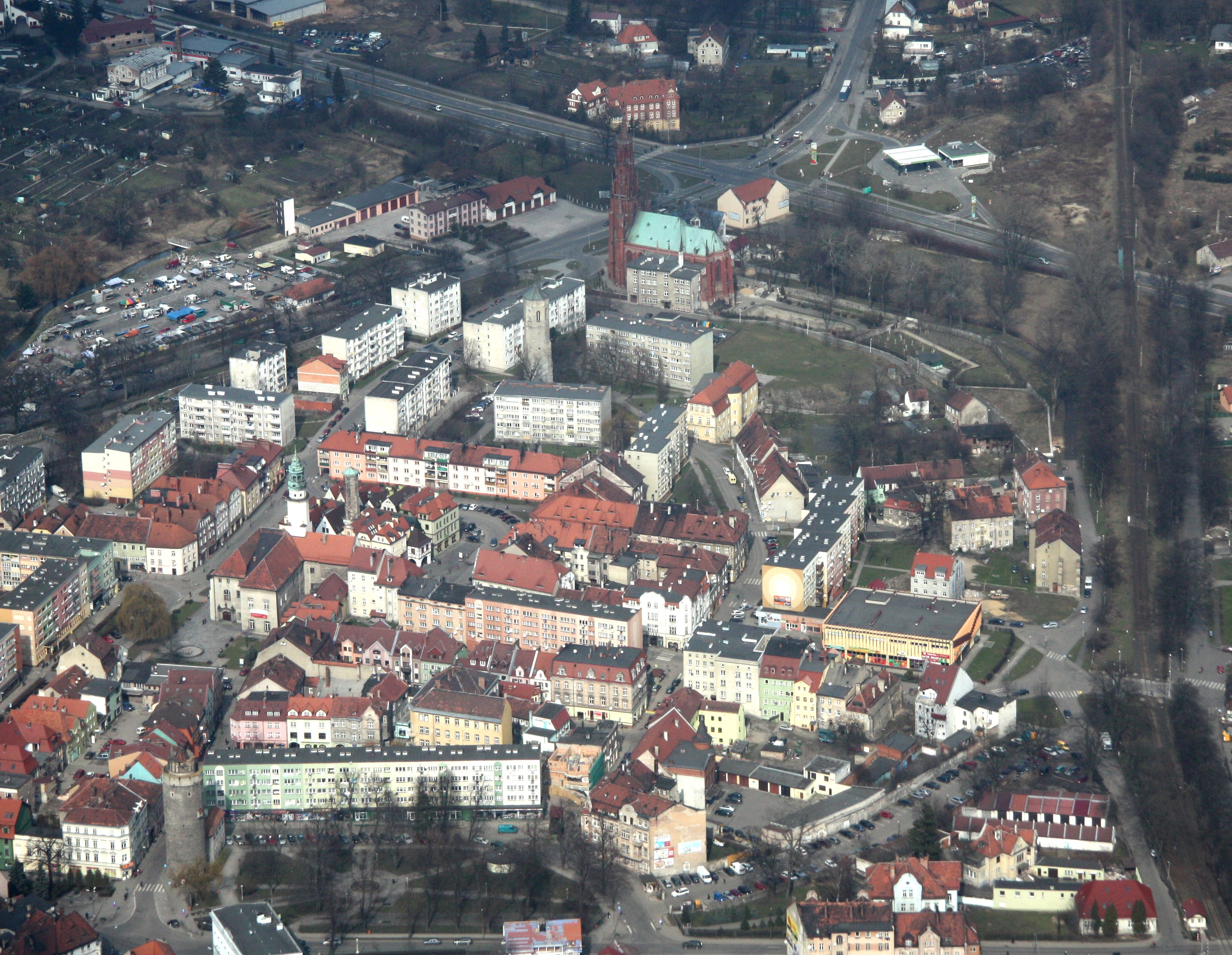 Lubaň